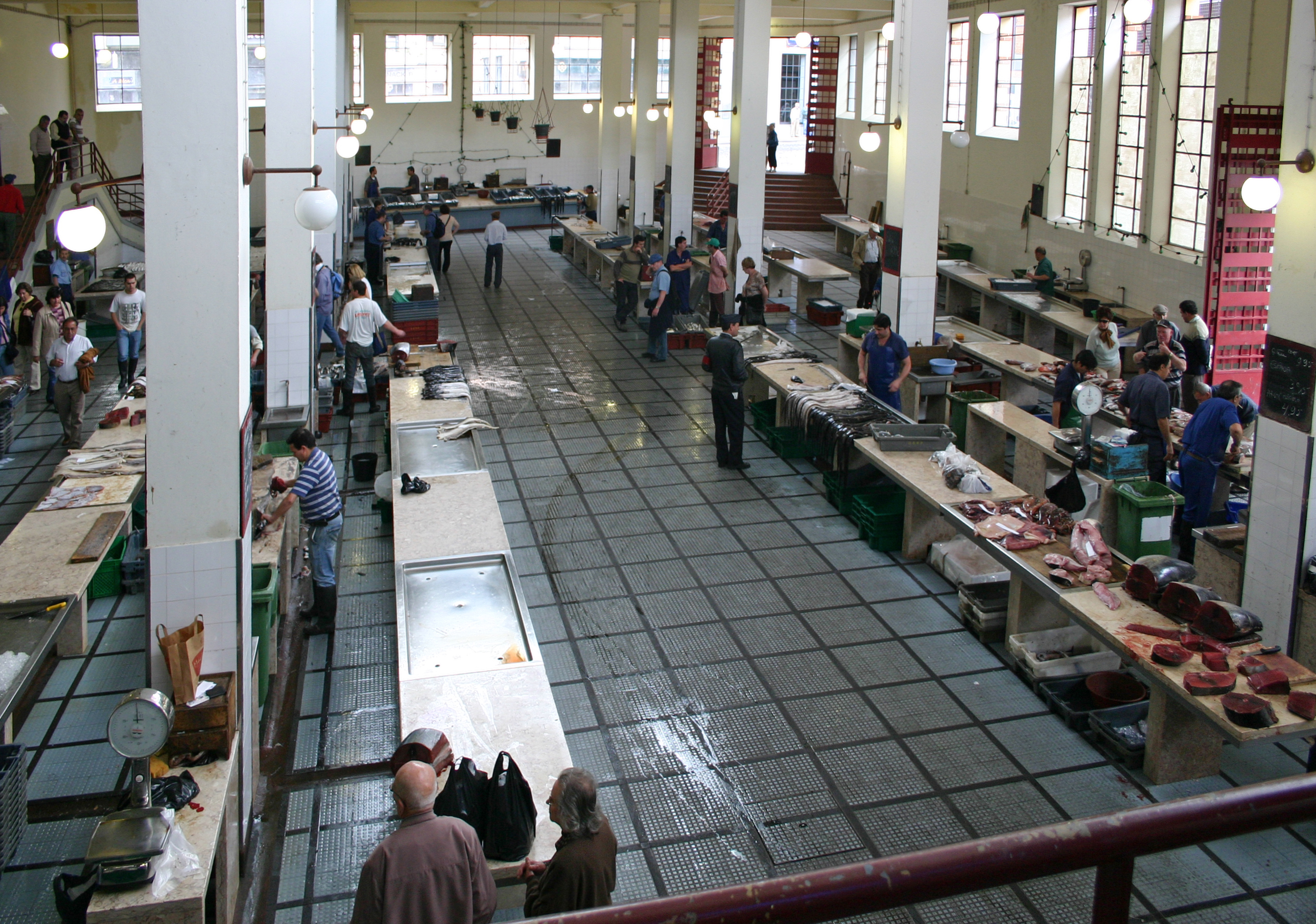 Funchal